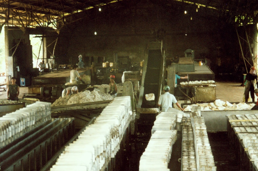 Philippinen: Latex-Fabrik in Basilan